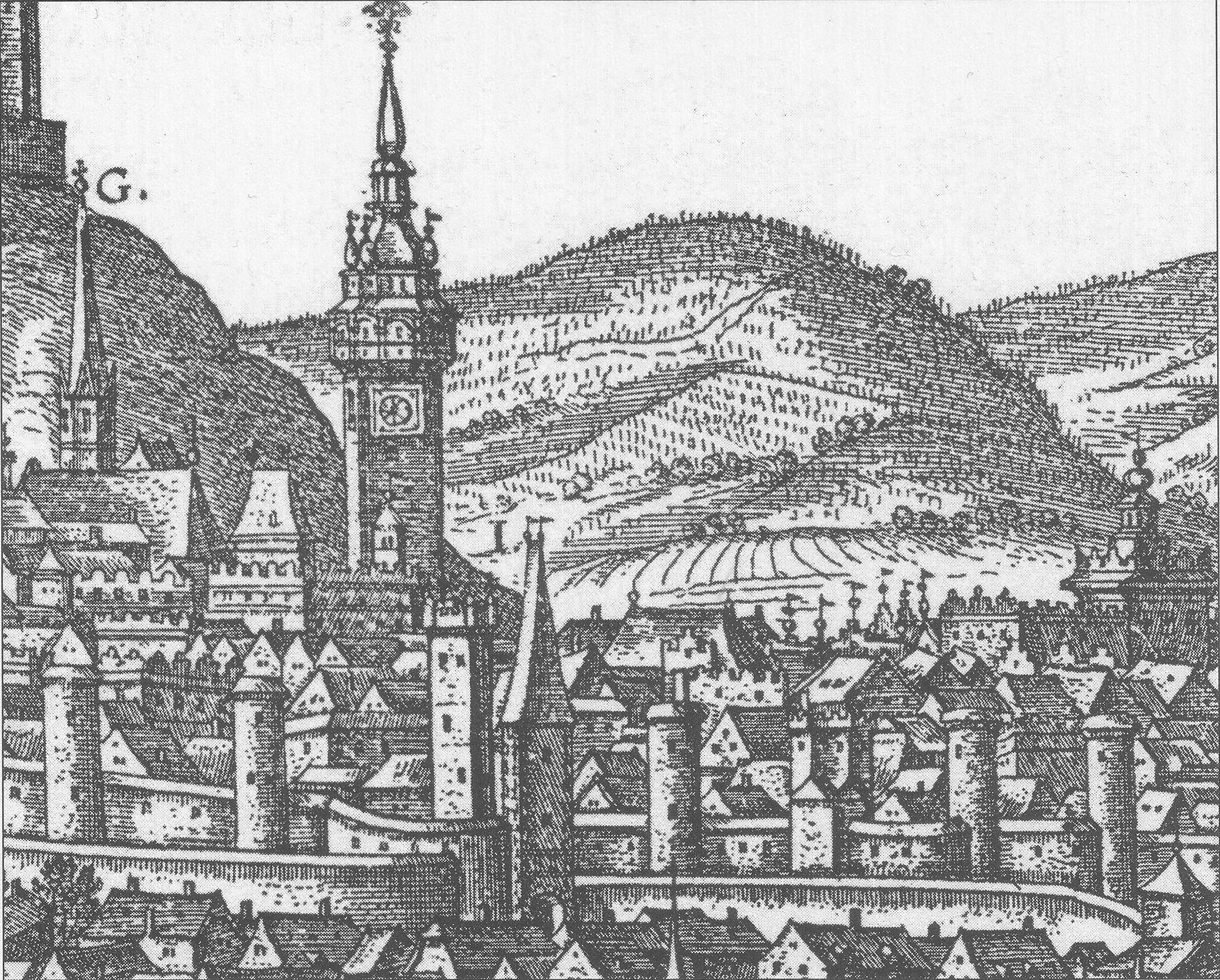 Město Brno se starou radnicí na rytině z roku 1617.